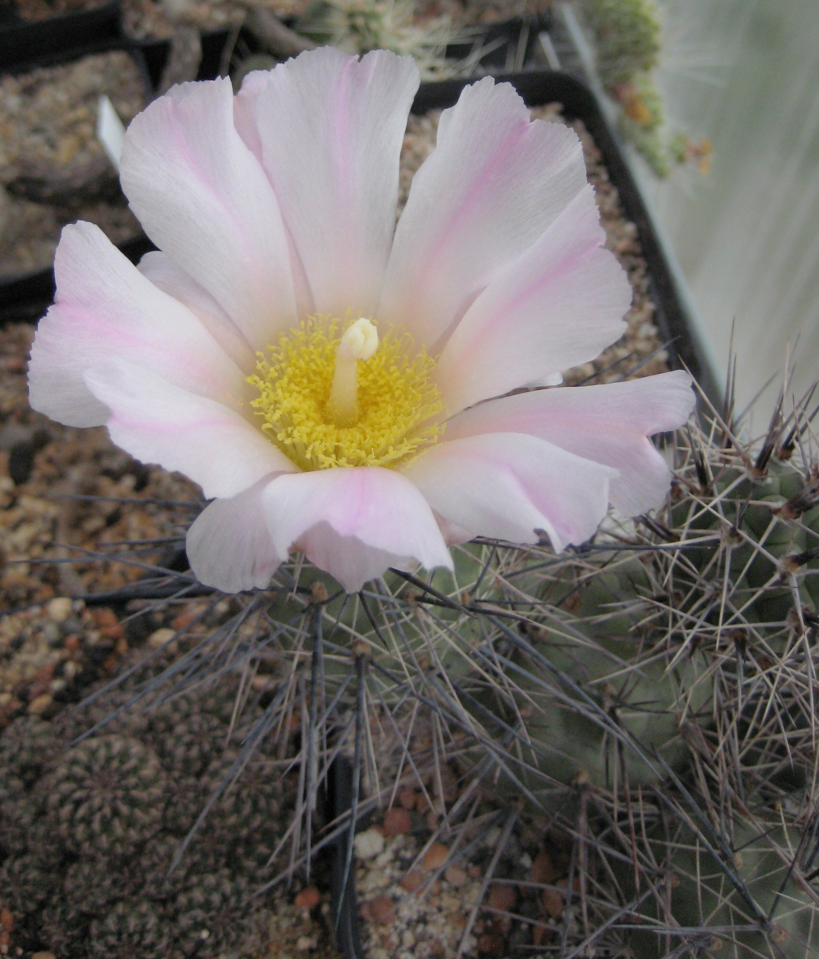 Tephrocactus alexanderi in Kultur